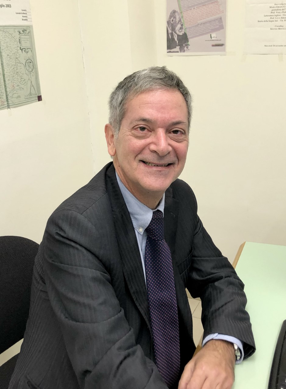 Claudio Giovanardi è un linguista e scrittore italiano